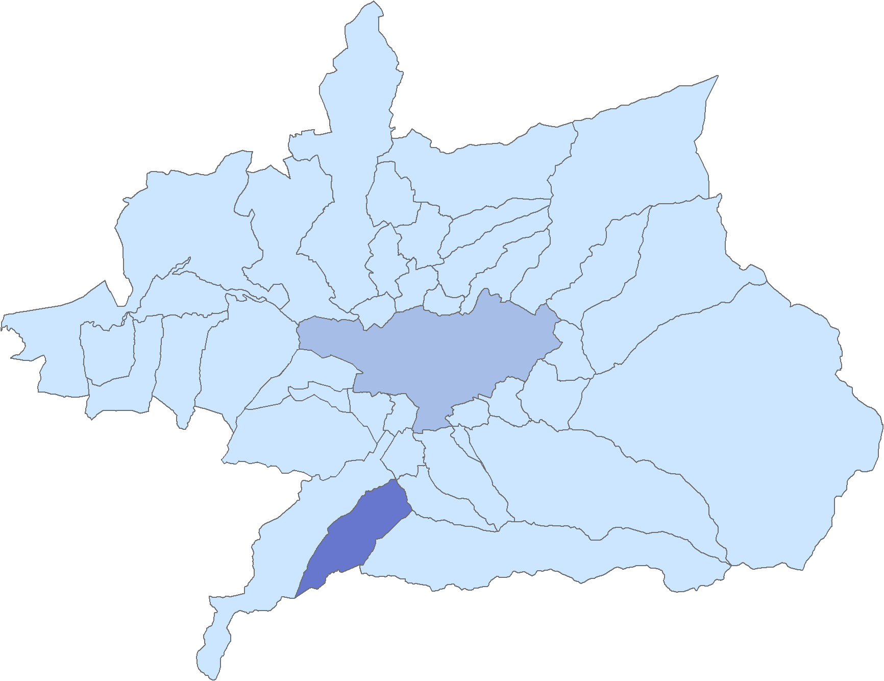 Situación del municipio de Villa de Otura respecto a la comarca de la Vega de Granada, en España.